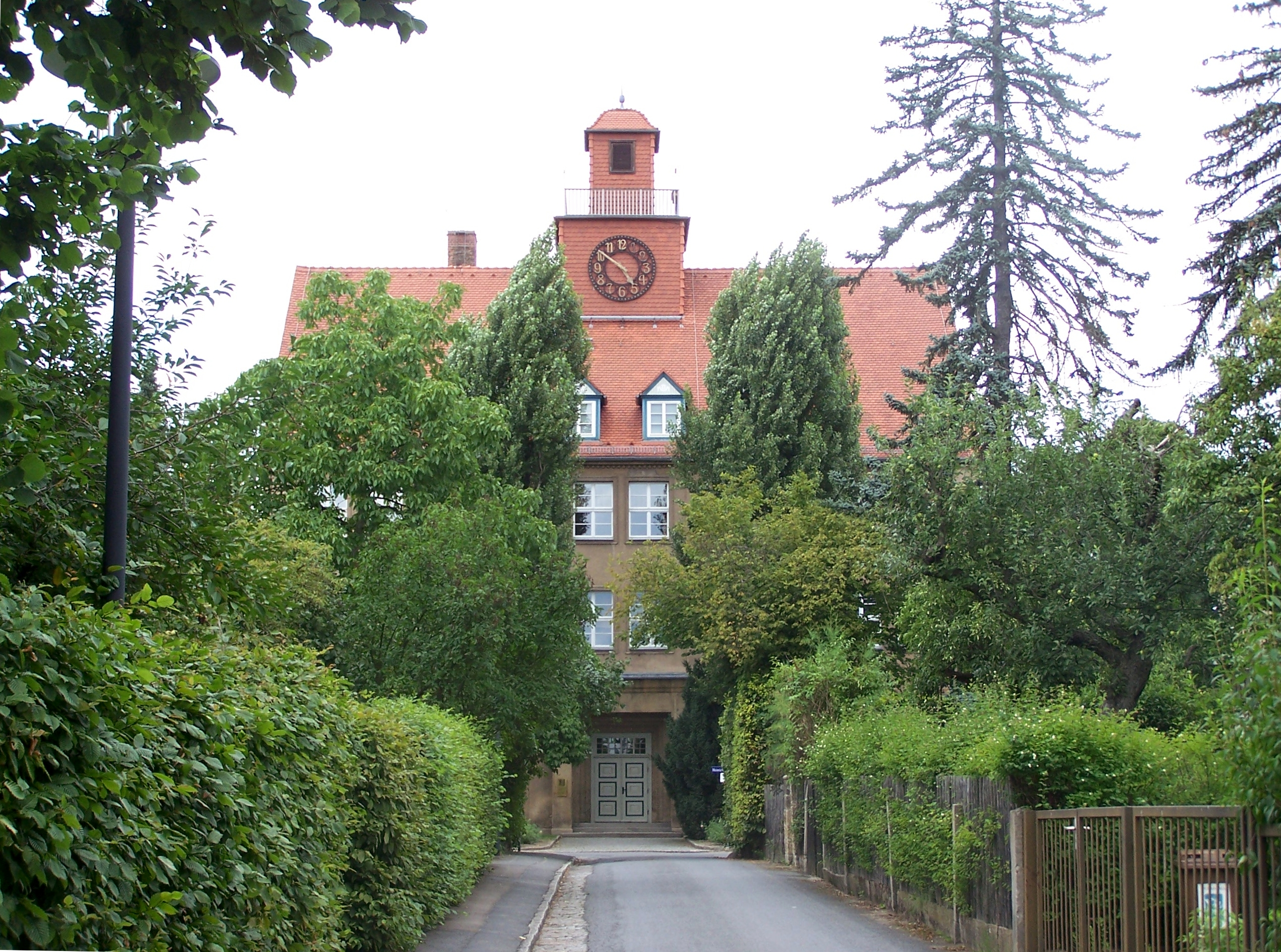 Schule in der Gartenstadt Hellerau, Curt/Kurt Frick 1914